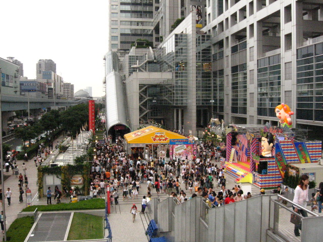 フジテレビのイベント『お台場冒険王』2006年のメイン会場の模様